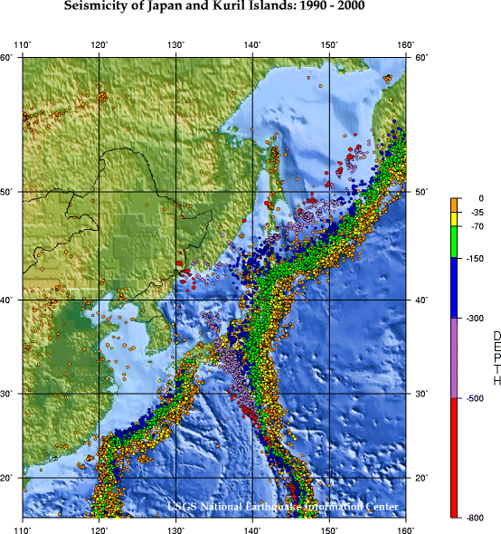 Japan - Kuril Islands - Kamchatka subduction